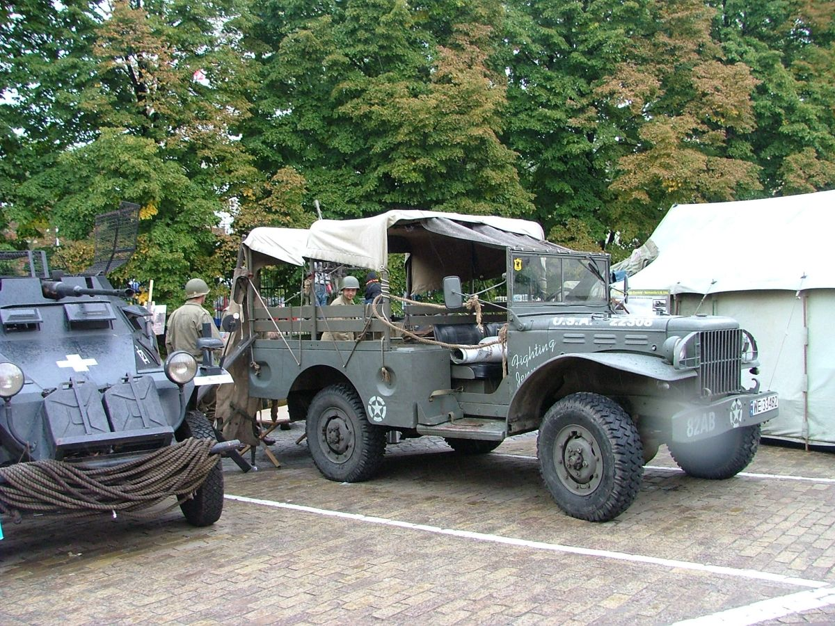 Poland, Warsaw, TVP, Dzień Otwarty Telewizji Polskiej, 9 września 2007